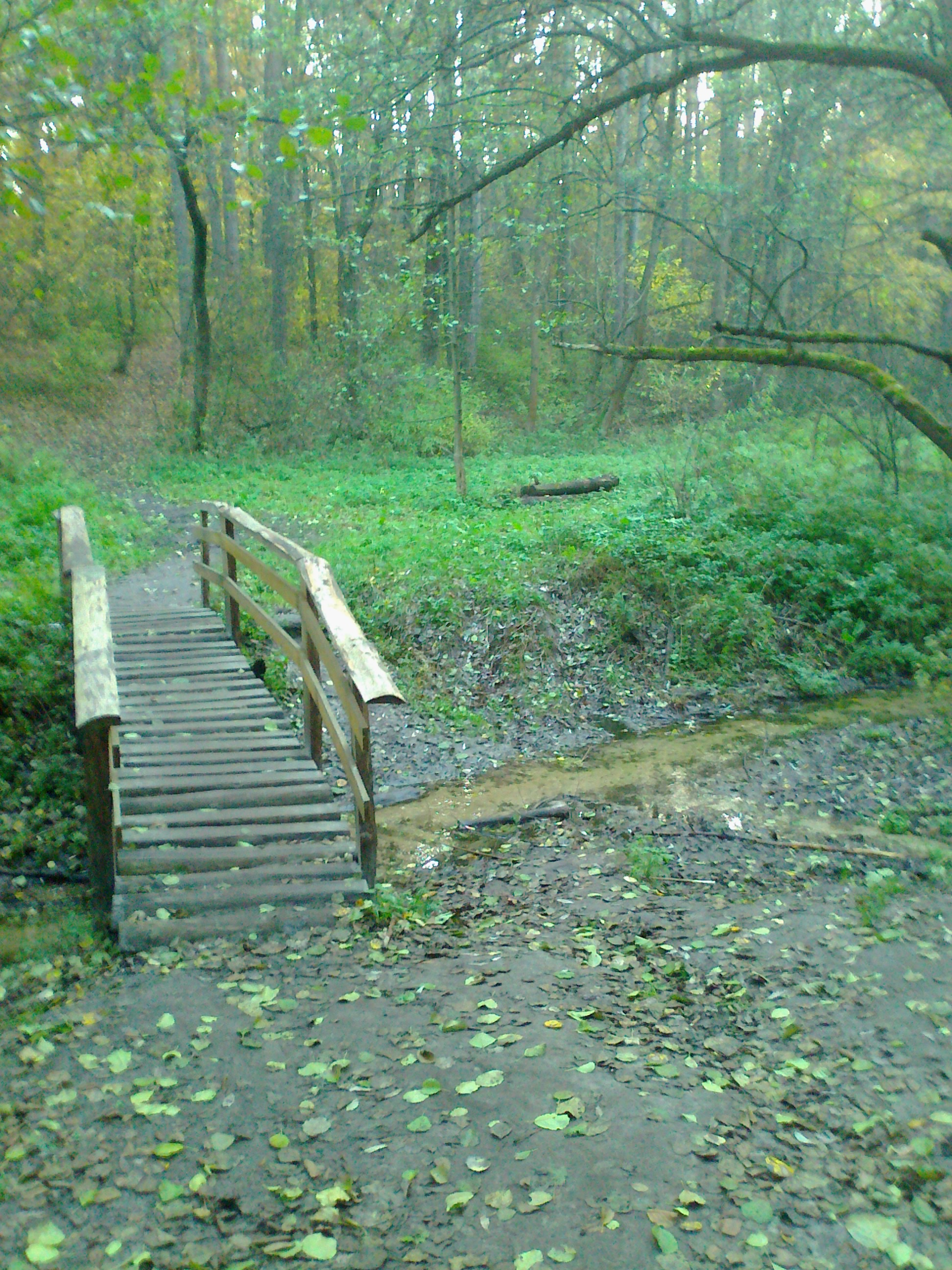 Річка Притворка, м. Боярка, Київська область